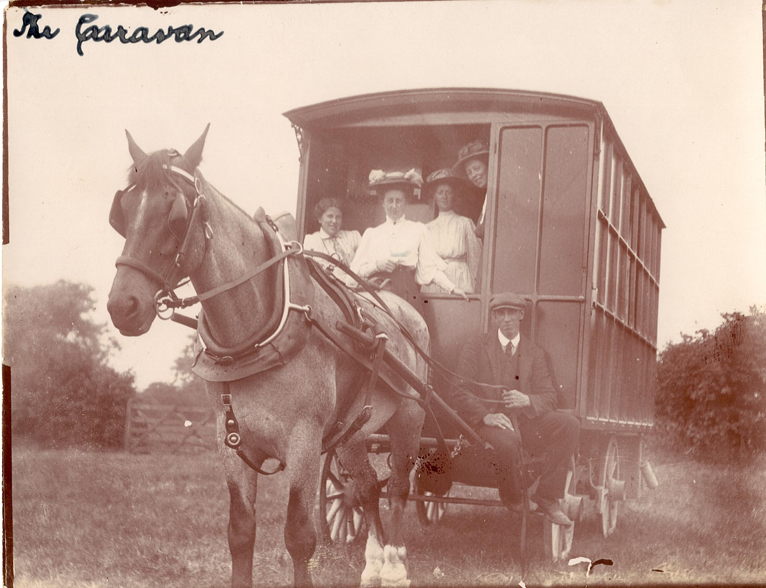 7BSG 5 2 4